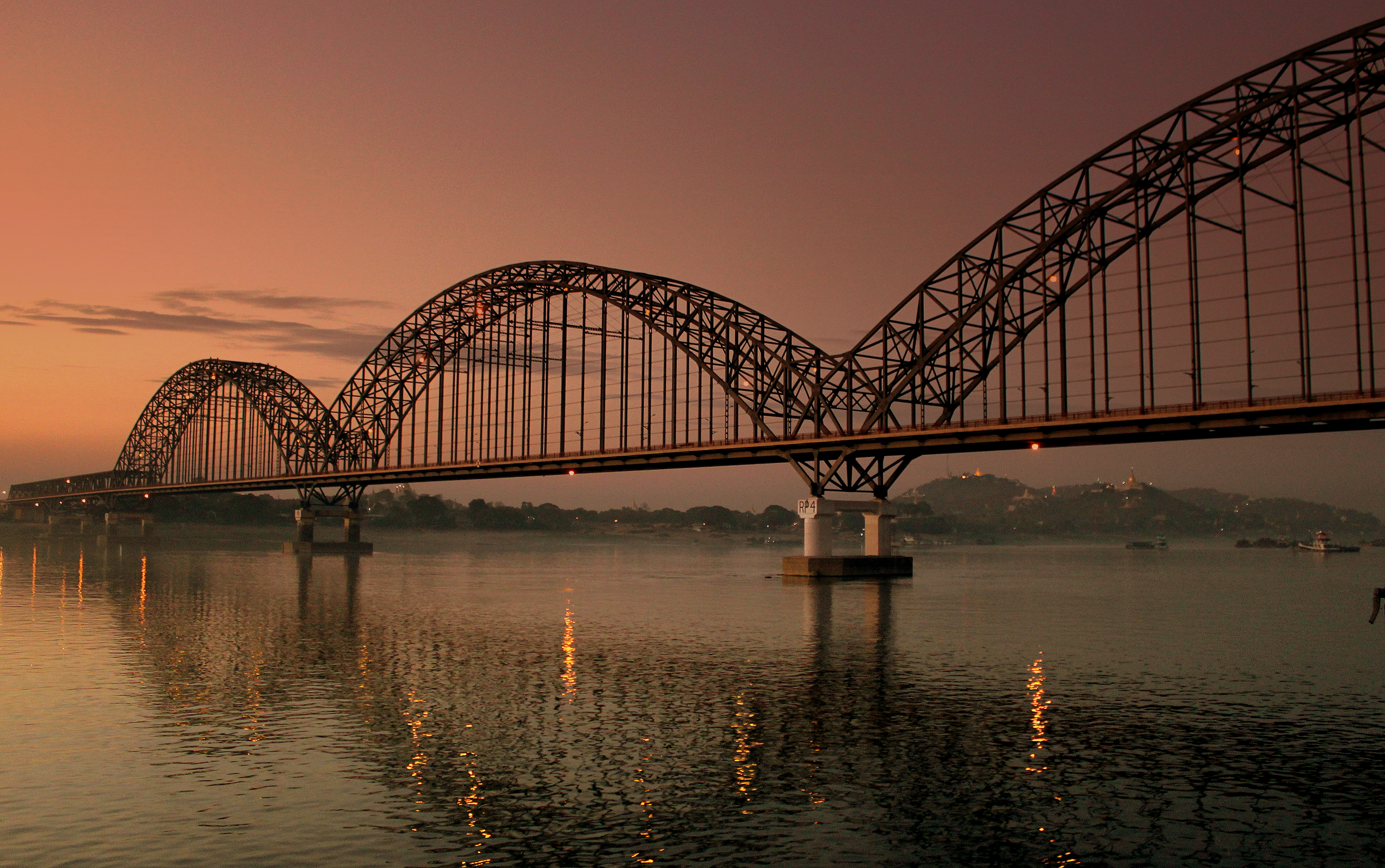 IRRAWADDY RIVER APPROACHING MANDALAY MYANMA FEB2013